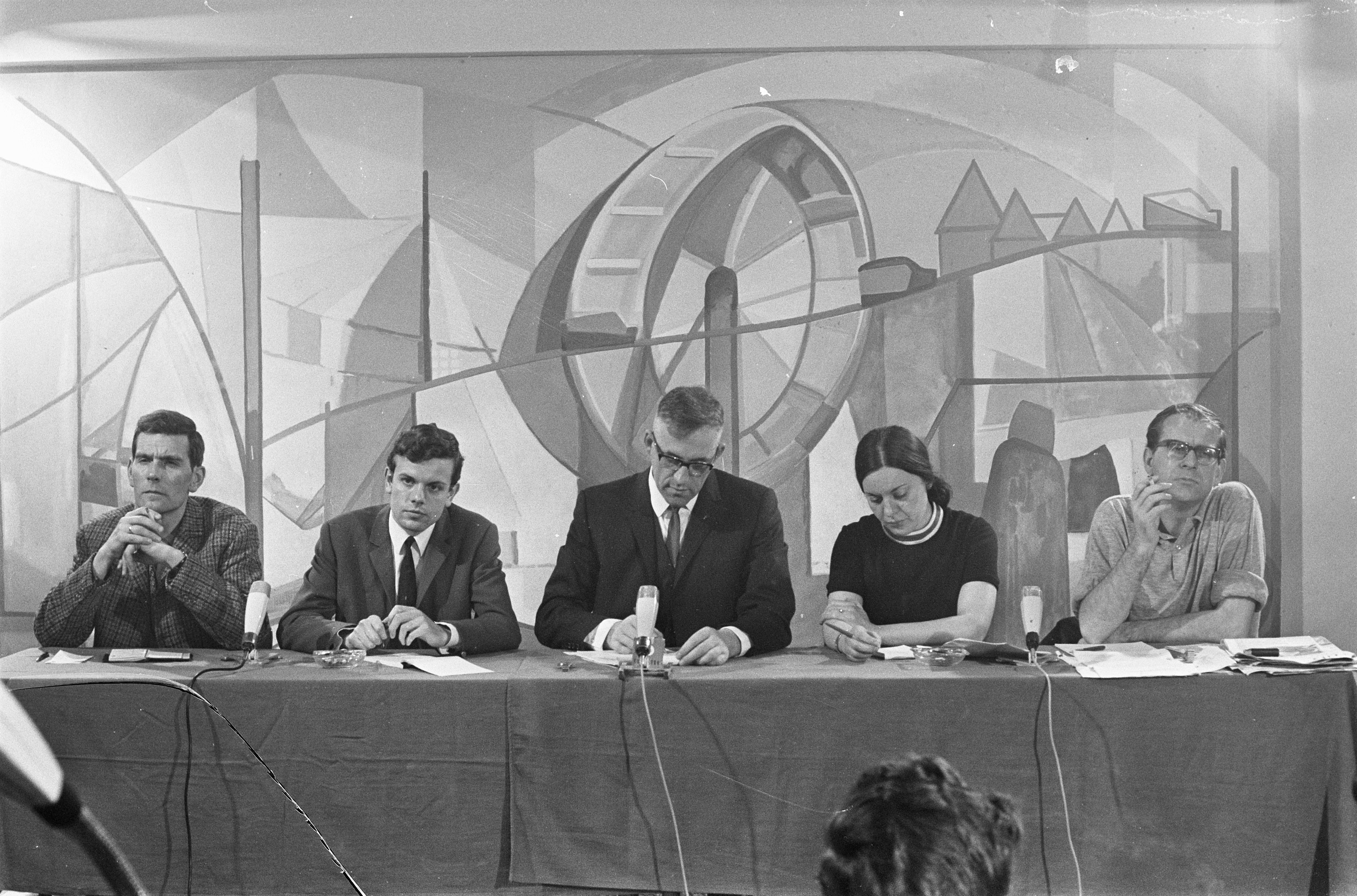 Amsterdam. Hearing op 28 januari 1969 in het Ignatiuscollege over het uittreden uit de Rooms Katholieke Kerk van studentenpastores. Het forum: v.l.n.r. pater Jos Vrijburg, A. Peters (studentenberaad), P. de Vries (gespreksleider), mej. Quant (studentenberaad) en pater Huub Oosterhuis. 28 januari 1969